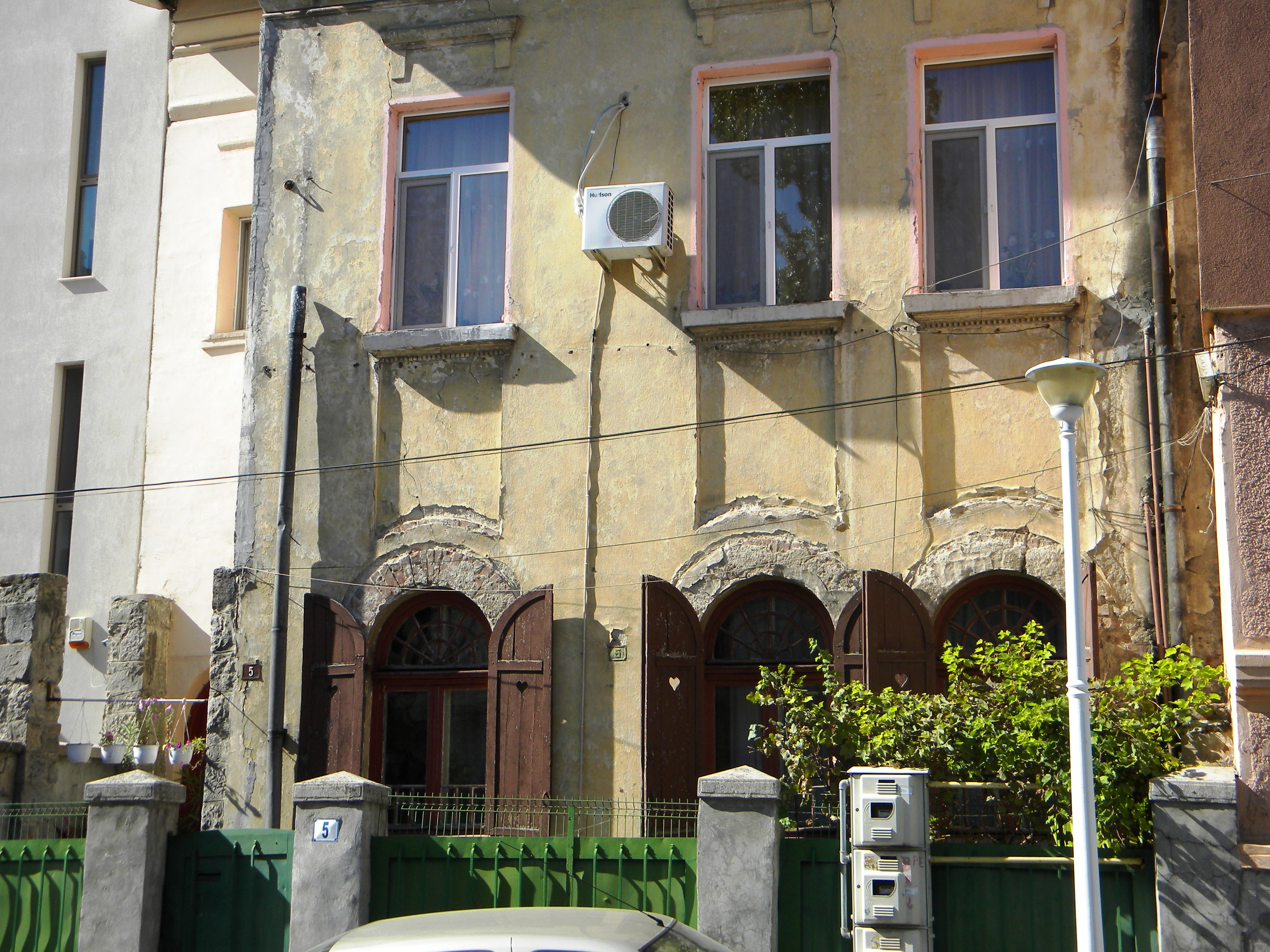 Bucuresti, Romania, Casa pe Str. Iulia Hasdeu nr. 5, sect. 1